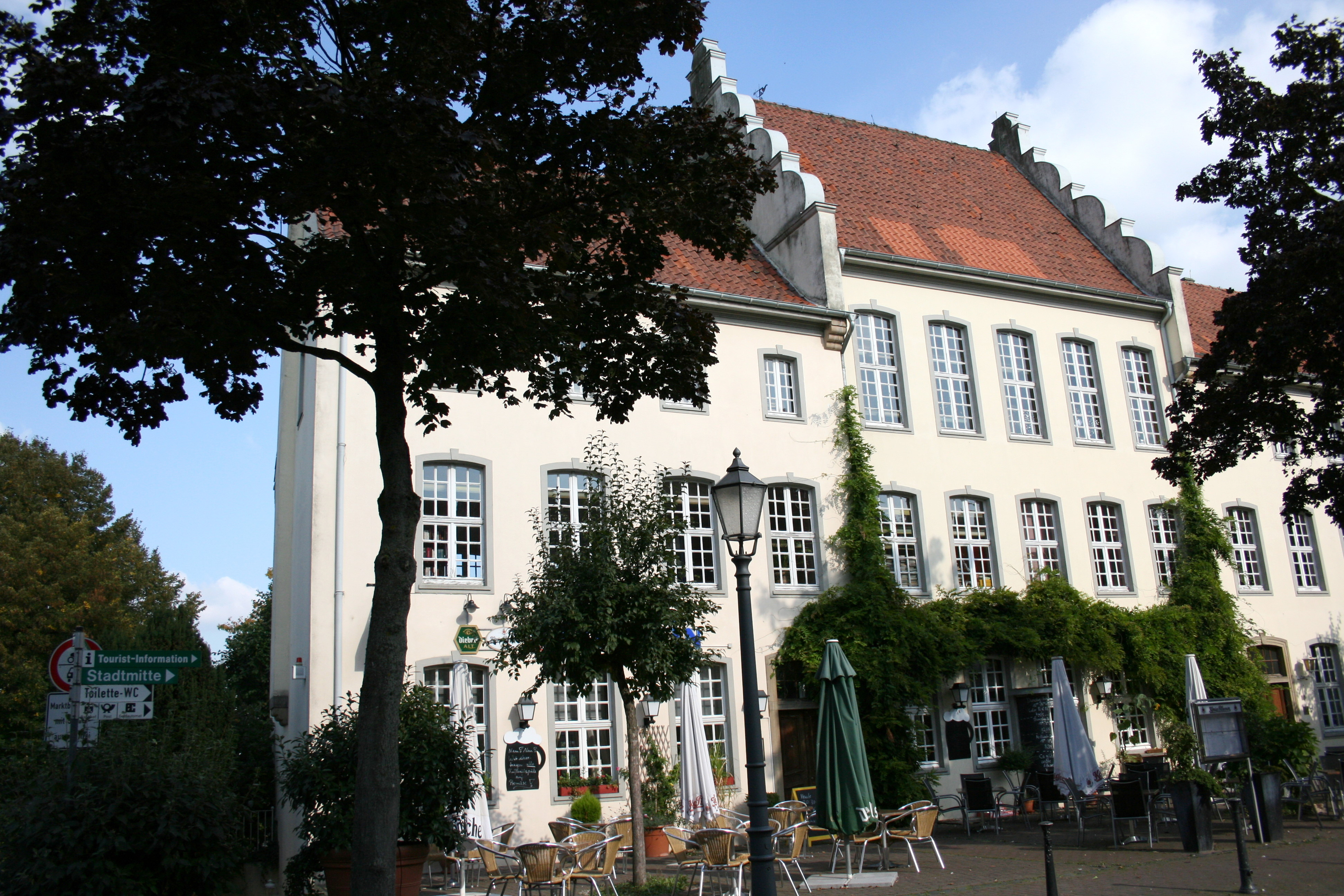 Altes Karthaus in der Straße Karthaus in Xanten